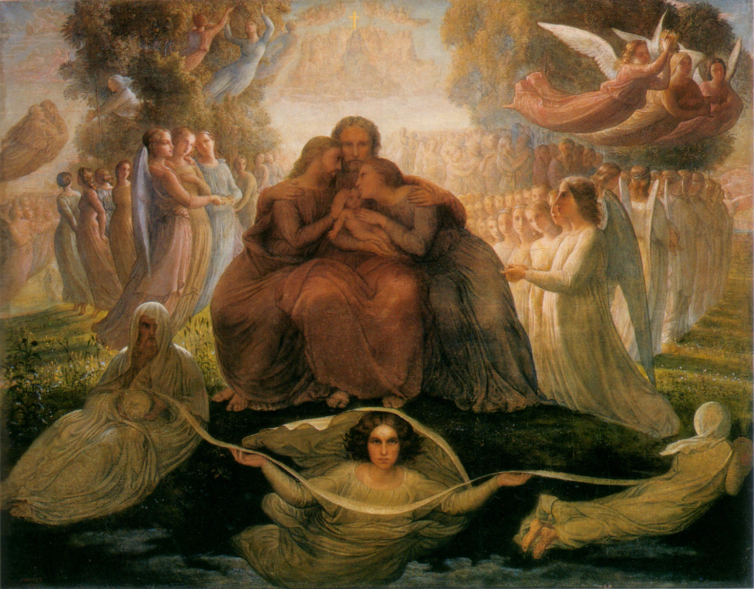 Poème de l'âme (1): Génération divinetitle QS:P1476,fr:"Poème de l'âme (1): Génération divine" label QS:Lfr,"Poème de l'âme (1): Génération divine"